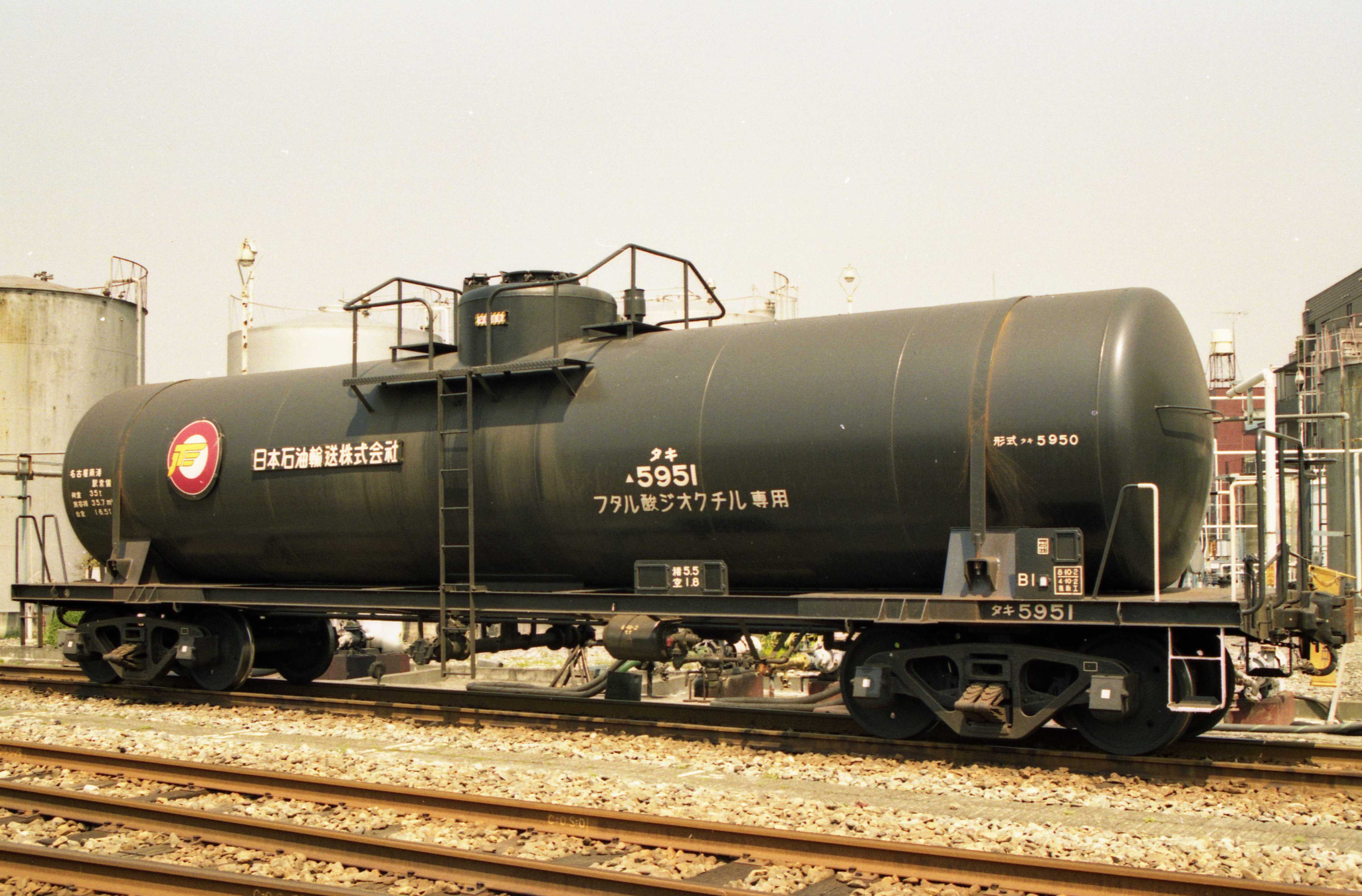 タキ5950形、タキ5951